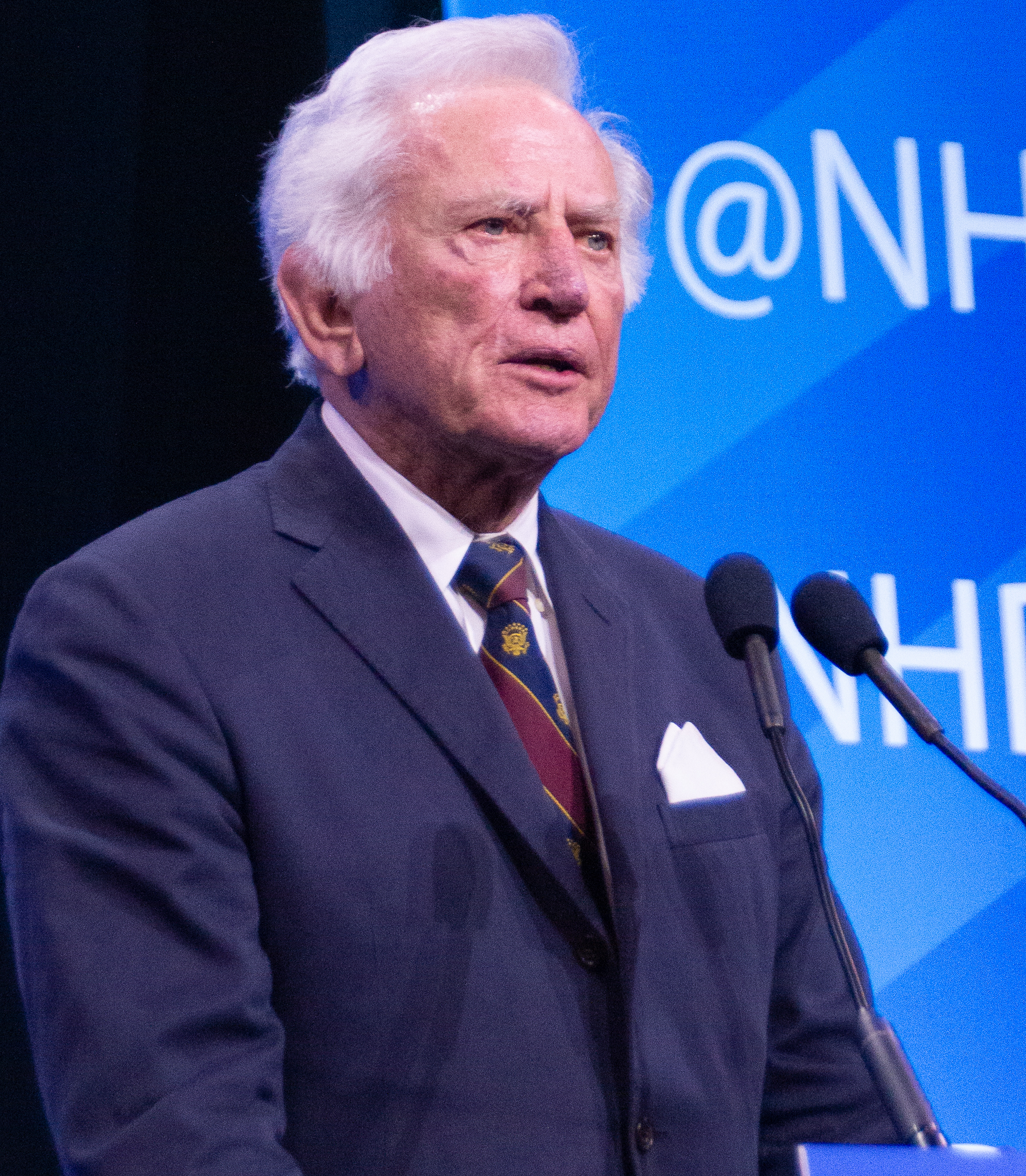 20190907-DSC04323